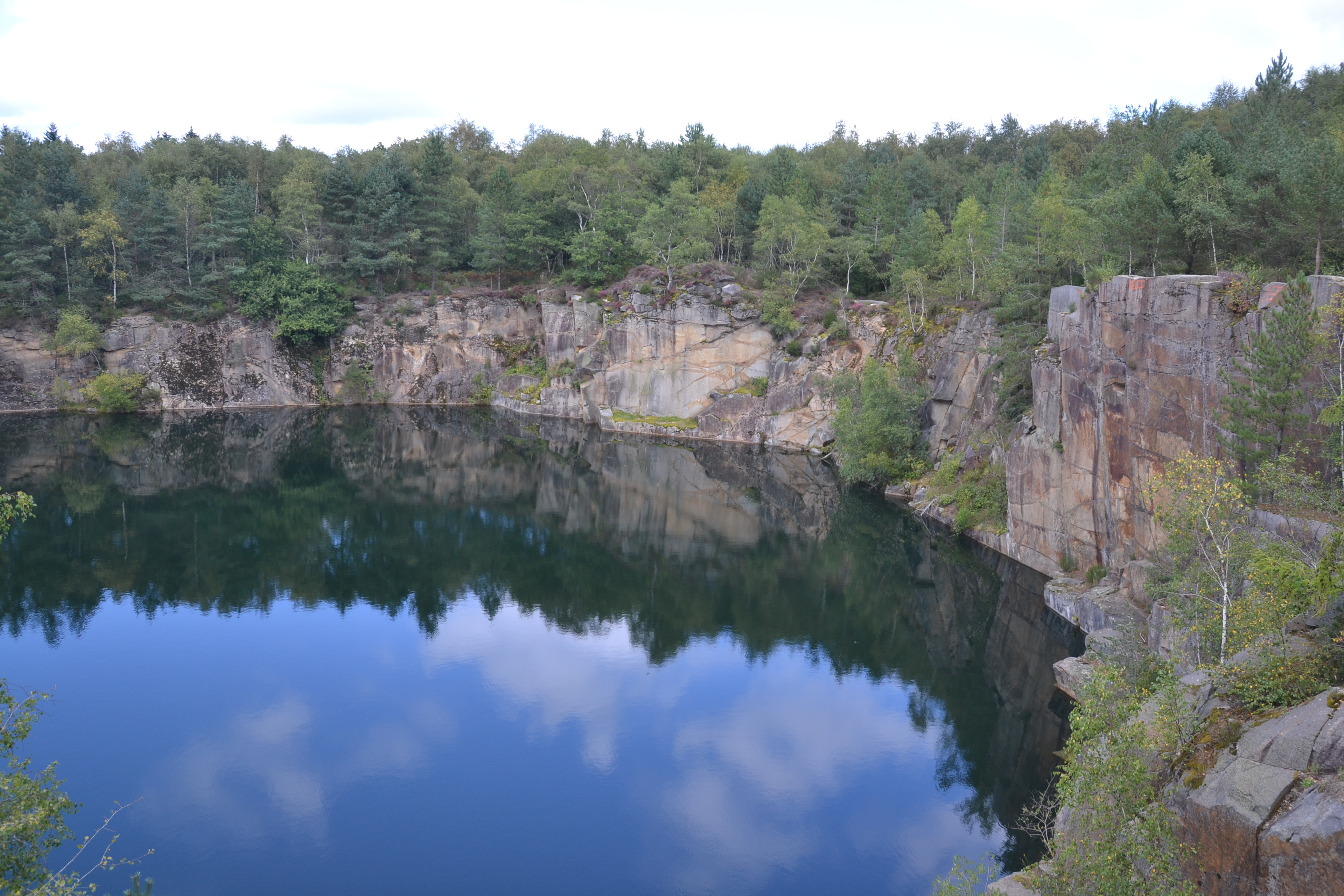 Anciennes carrières de granite du Maupuy (Saint-Léger-le-Guérétois, Creuse, France).